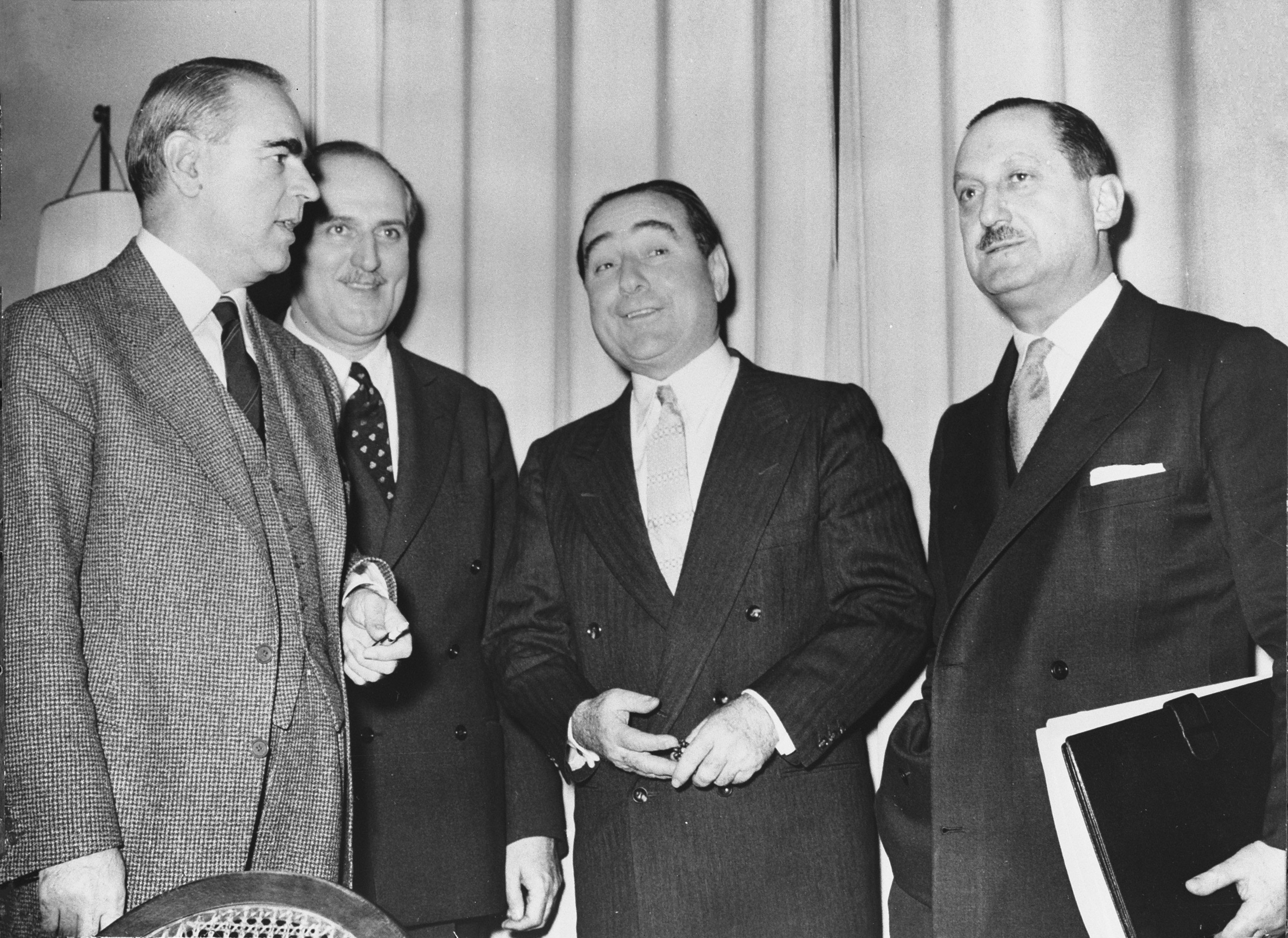 Cyprusconferentie tussen Griekenland en Turkije in Zurich v.l.n.r. premier Karamanlis (Griek), Zorlu minister van Buitenlandse Zaken, Menderes (Turkije) en Evangelos Averoff.